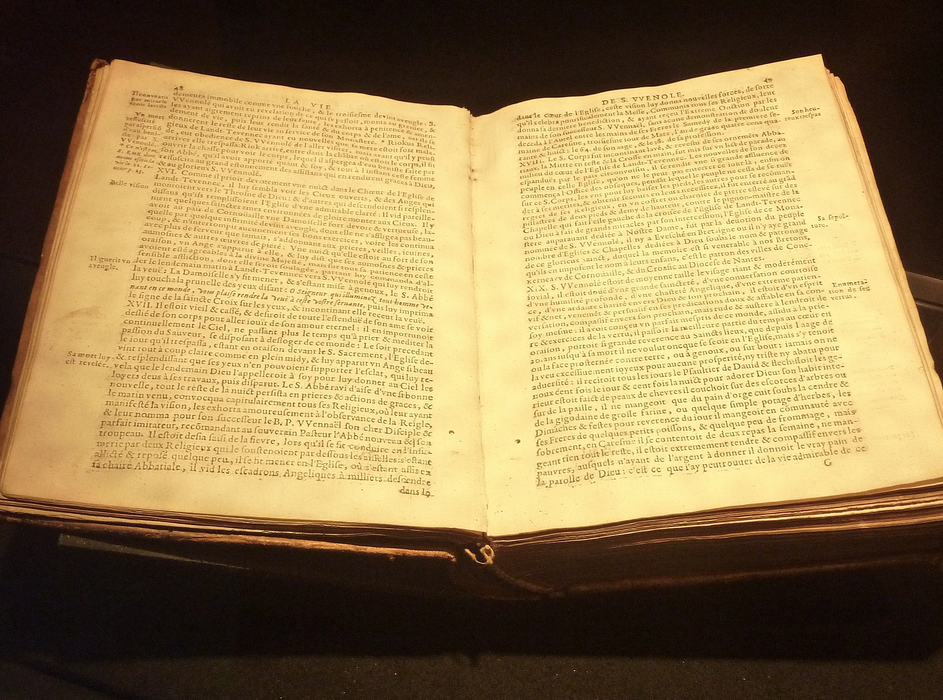 Albert le Grand : pages de son livre "La vie, gestes, mort et miracles des Saints de la Bretagne Armorique, ensemble un catalogue des évêques des neuf eveschés d'icelle" (1637) (Musée de l'abbaye de Landévennec)